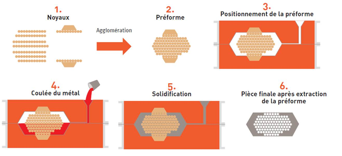 Processus de fabrication des mousses métalliques par moulage directe